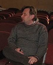 Marek Strandberg Erakonna Eestimaa Rohelised arengu teemalises avatud ruumis Tallinnas